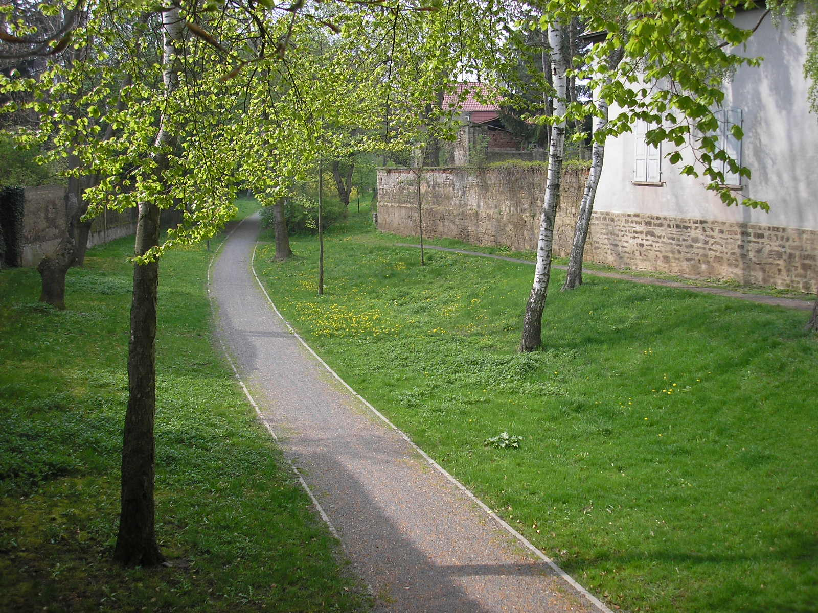 Teil des Grabens vor der Stadtmauer in Greußen (Thüringen).